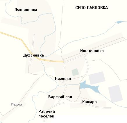 План села Павловка Мордовского района Тамбовской области с названием составных частей (улиц)